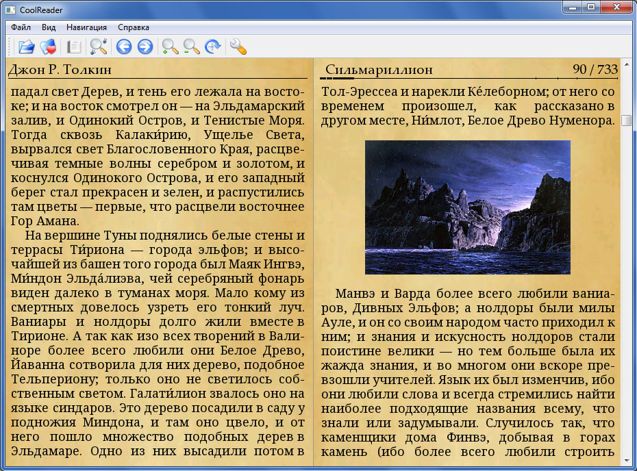 Скриншот главного окна программы CoolReader